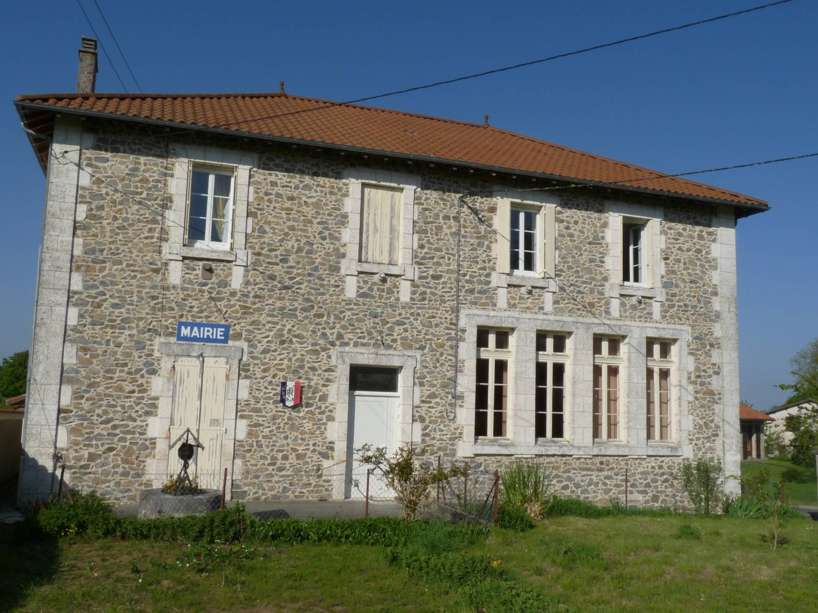 Mairie de Verneuil, Charente, France